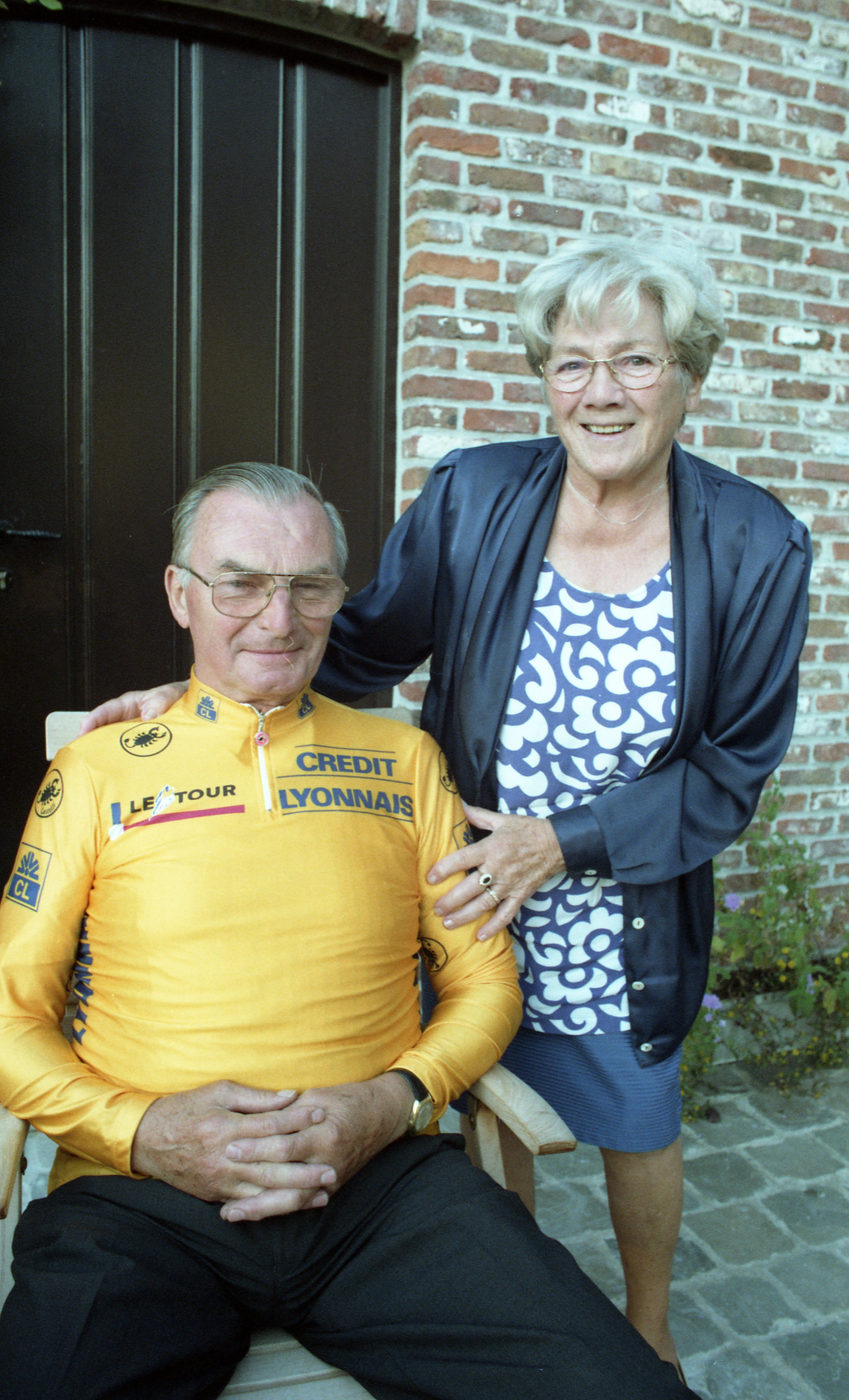 Oud-wielrenner Norbert Callens poseert met zijn gele trui van de Ronde van Frankrijk die hij in 1994 ontving, 45 jaar na zijn gemiste gele trui die hij in 1949 niet kreeg.